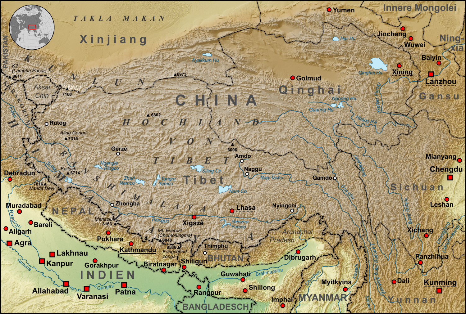 Topographische Karte der chinesischen autonomen Provinz Tibet, sowie der umliegenden chinesischen Provinzen und der angrenzenden Länder